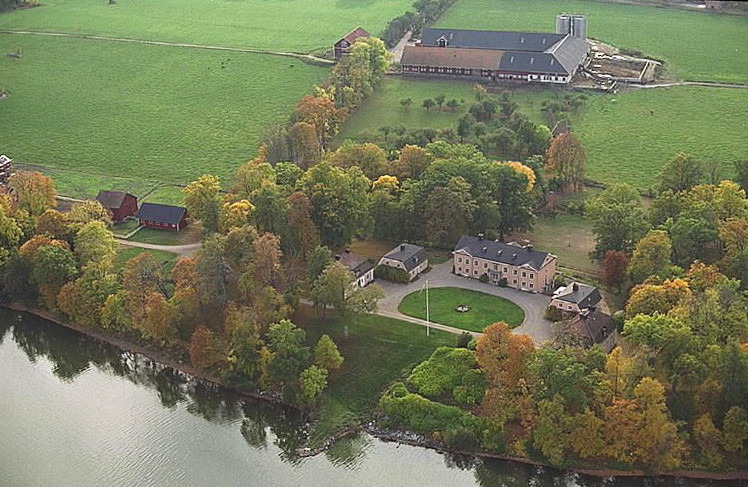 Motiv: Forsby Nyckelord: Flygbilder, Riksintressen Kategori: Herrgårds-/slottslandskapForsby